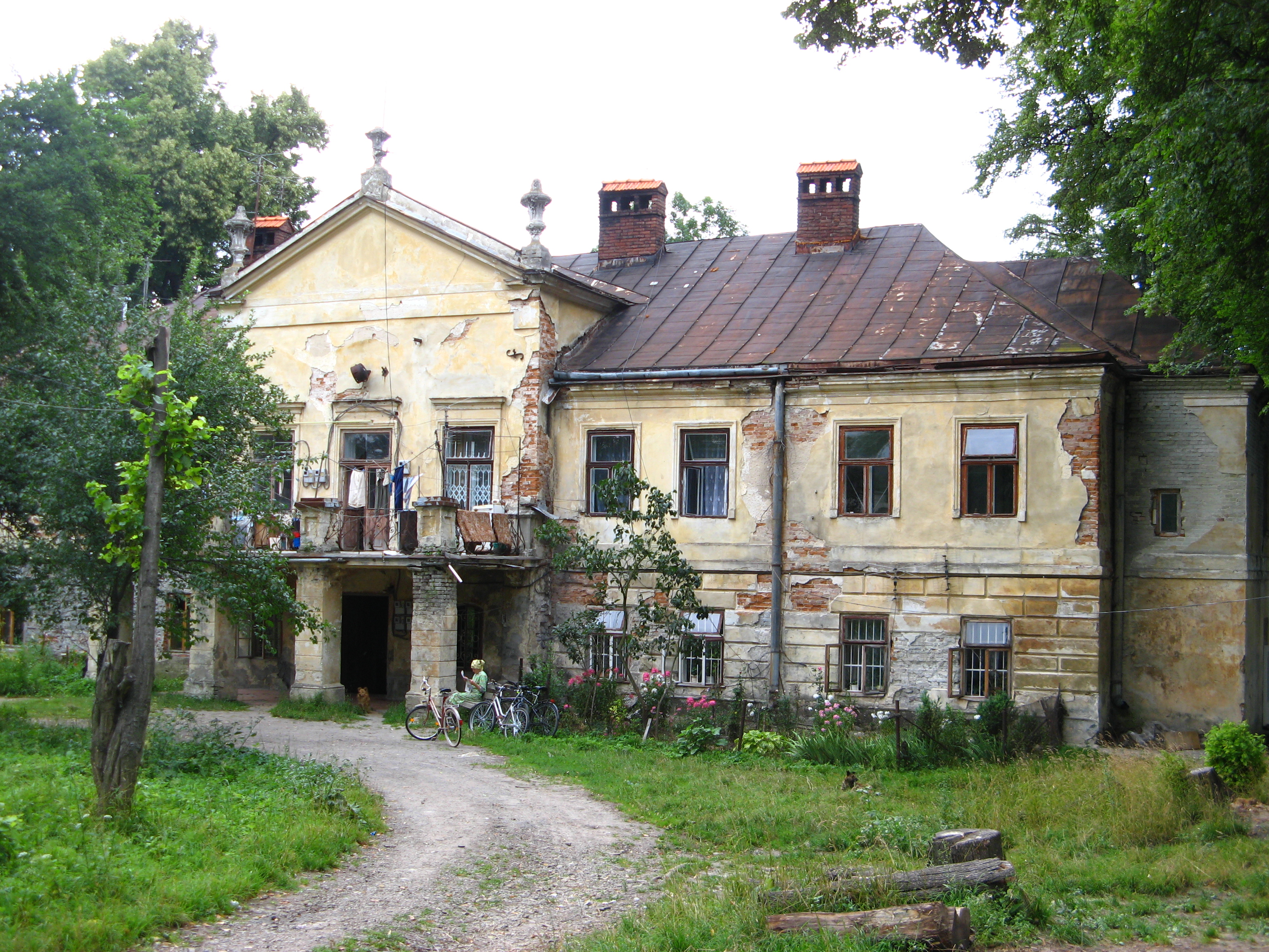 Pałac w Grzędzie, rejon żółkiewski